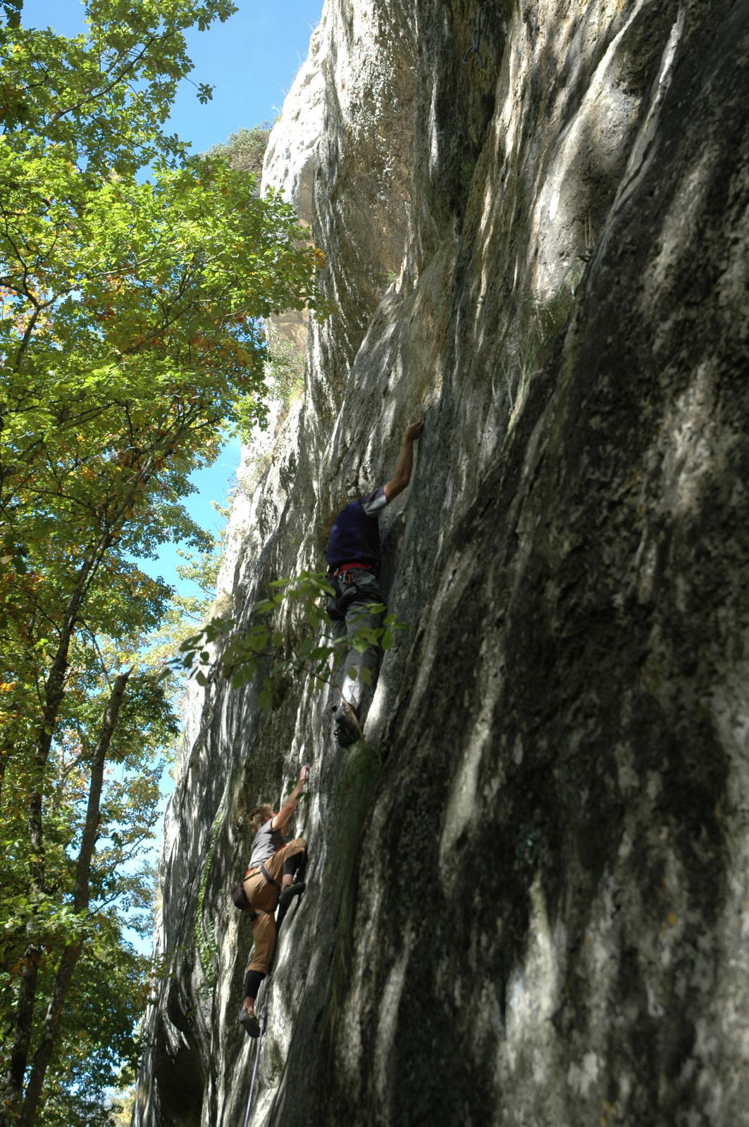 St Loup, secteur Bain de sang